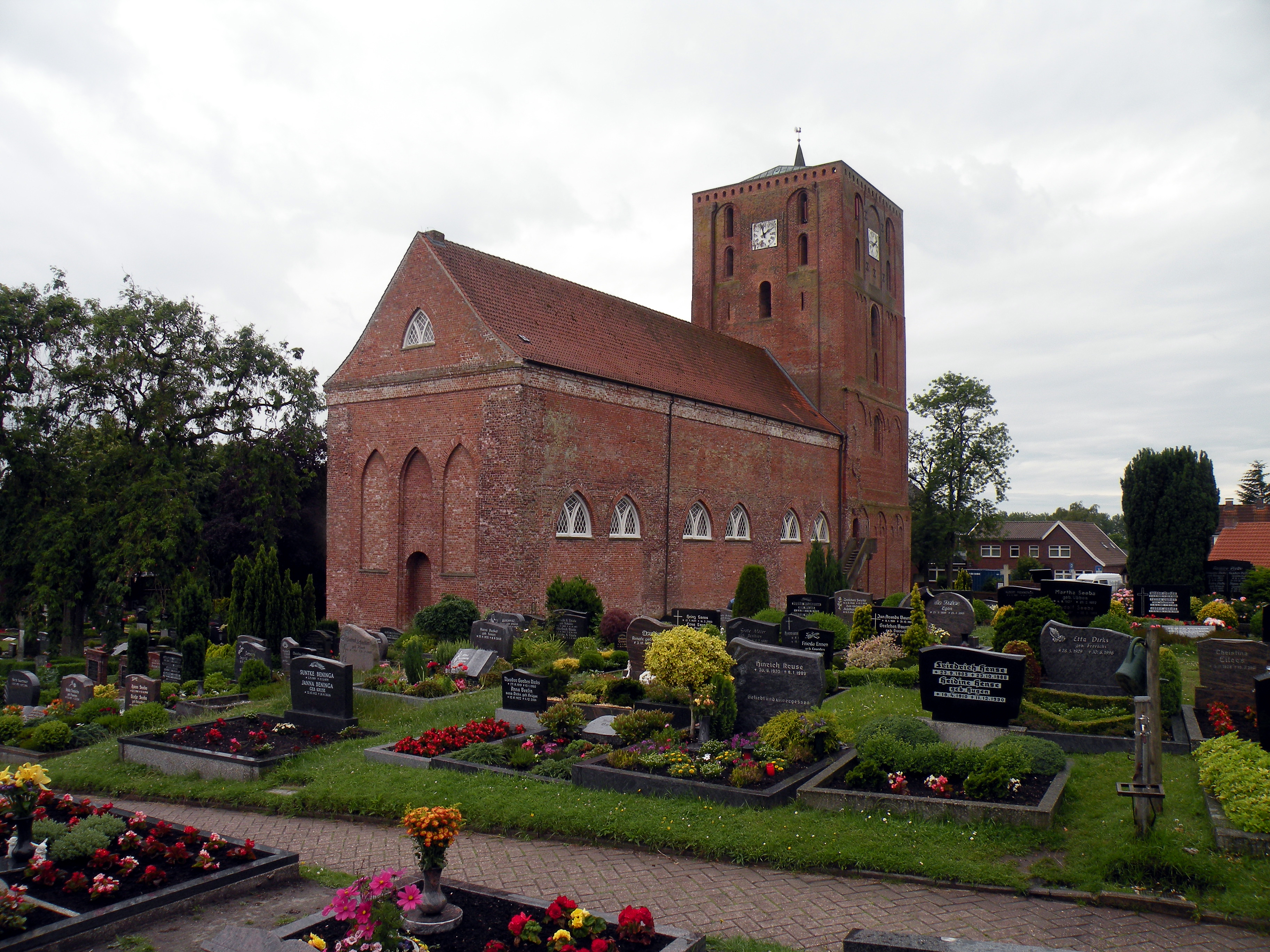 Marienkirche in Marienhafe